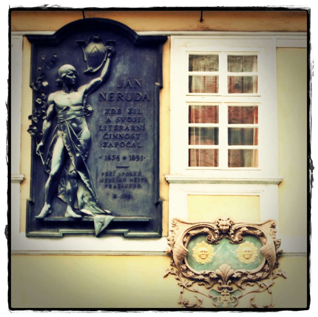 Jan Neruda's house, Neudaova Street, Prague. Dům Jana Nerudy v Praze - Dům U dvou slunců